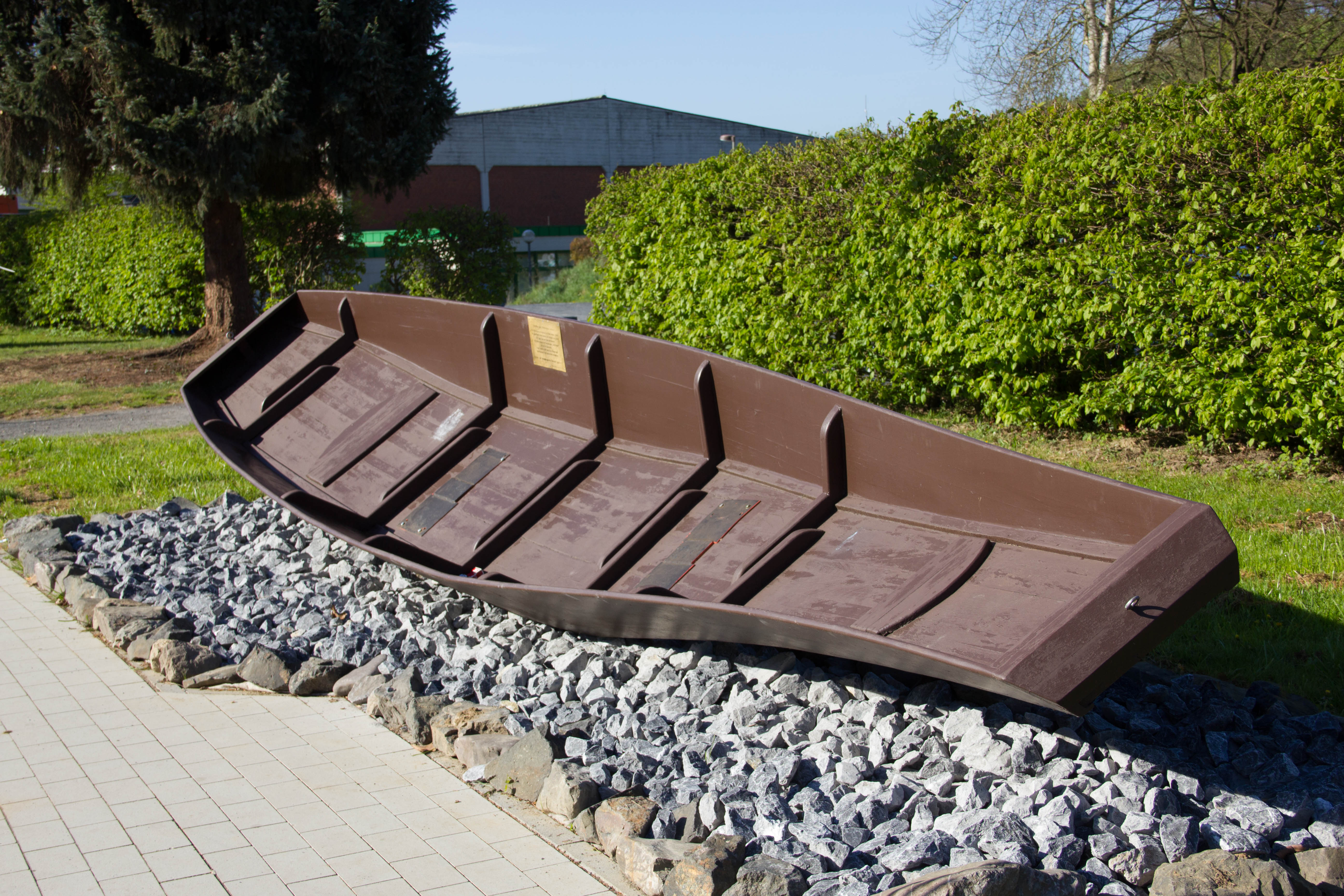 Nachbau eines Aggernaachen auf der Museumsmeile des Verkehrs- und Verschönerungsvereins Wahlscheid / Aggertal e.V.